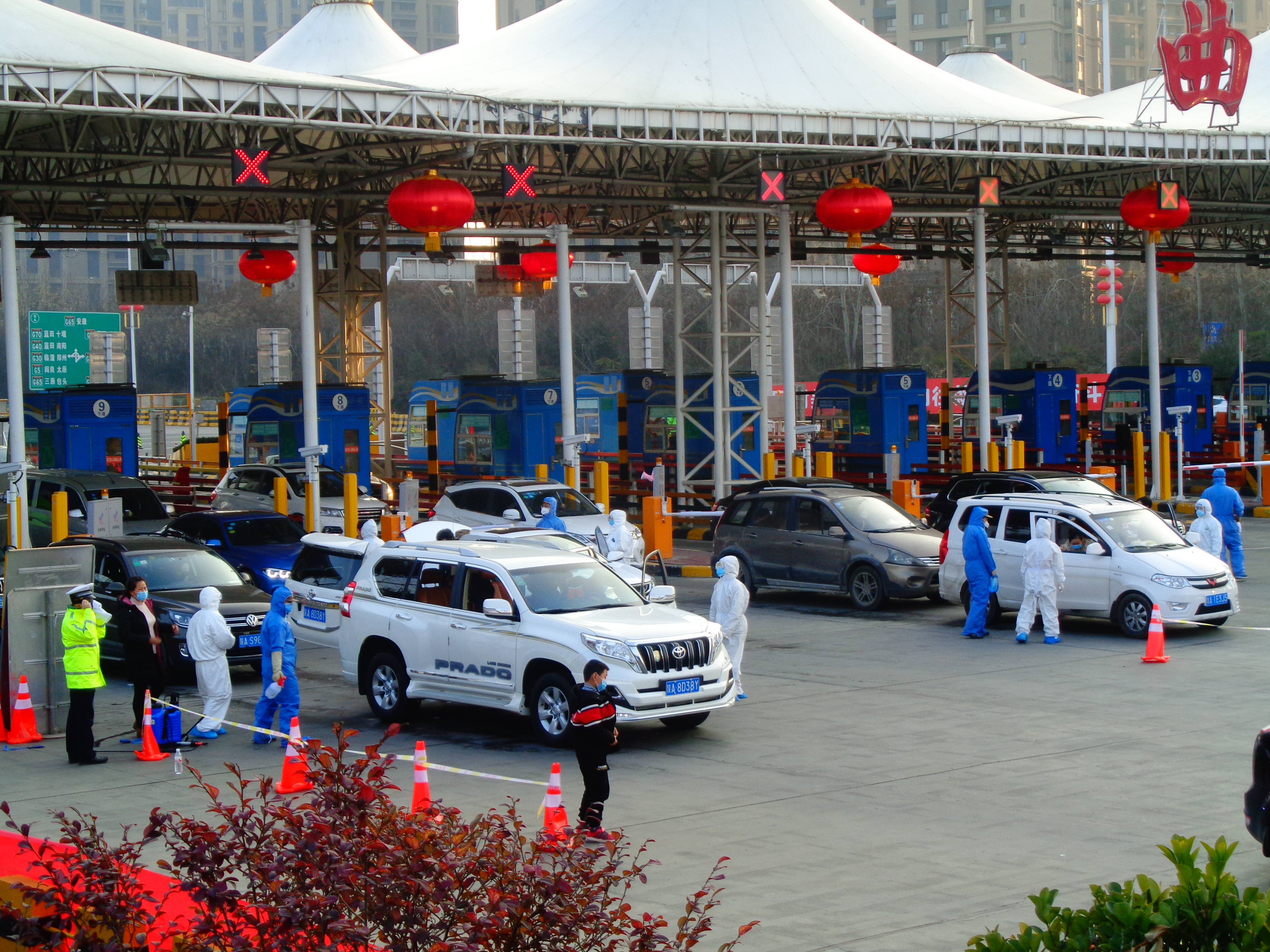 西安市雁塔区曲江收费站的防疫检查